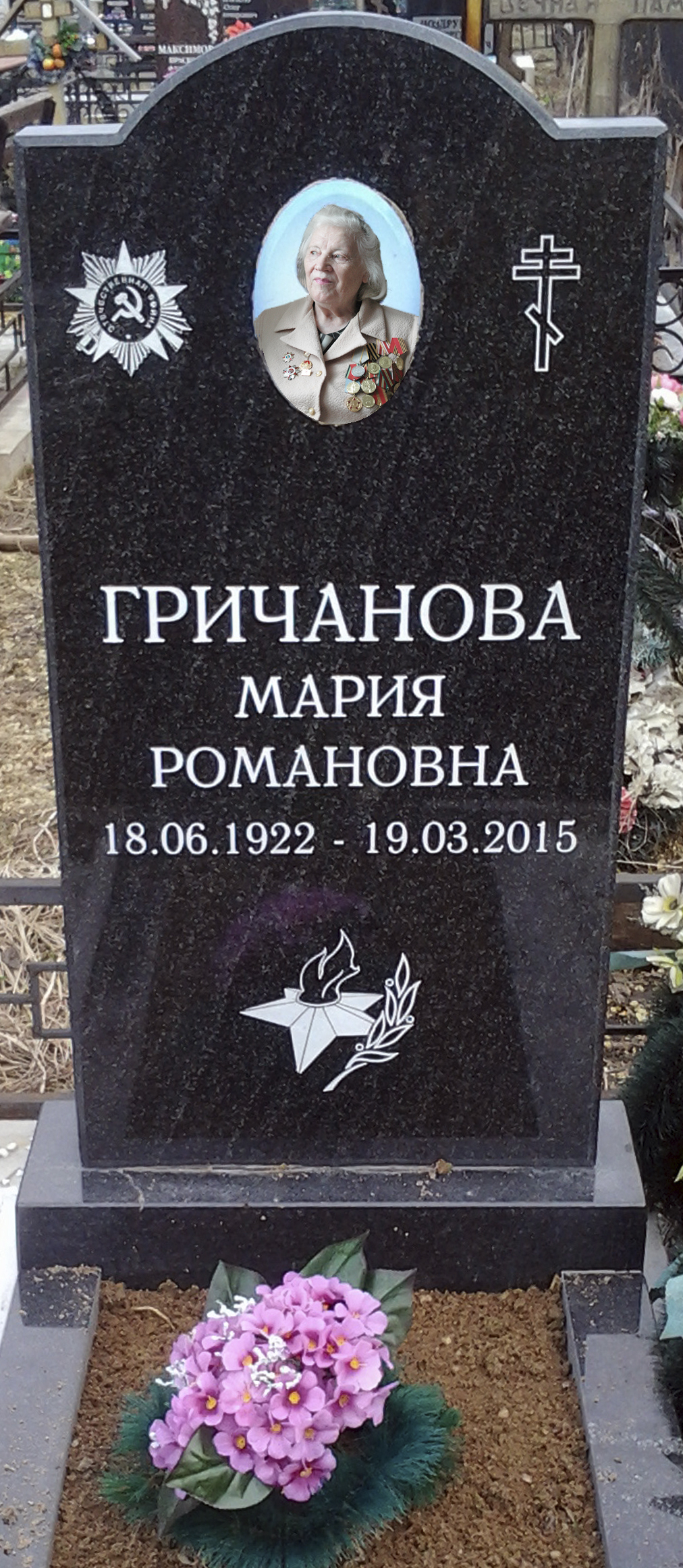 Гричанова Мария Романовна, памятник на могиле на Казанском кладбище в Пушкине, 2017 год.